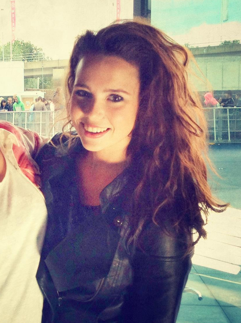 Xite VJ's Gwen van Poorten en Celine Bernaerts